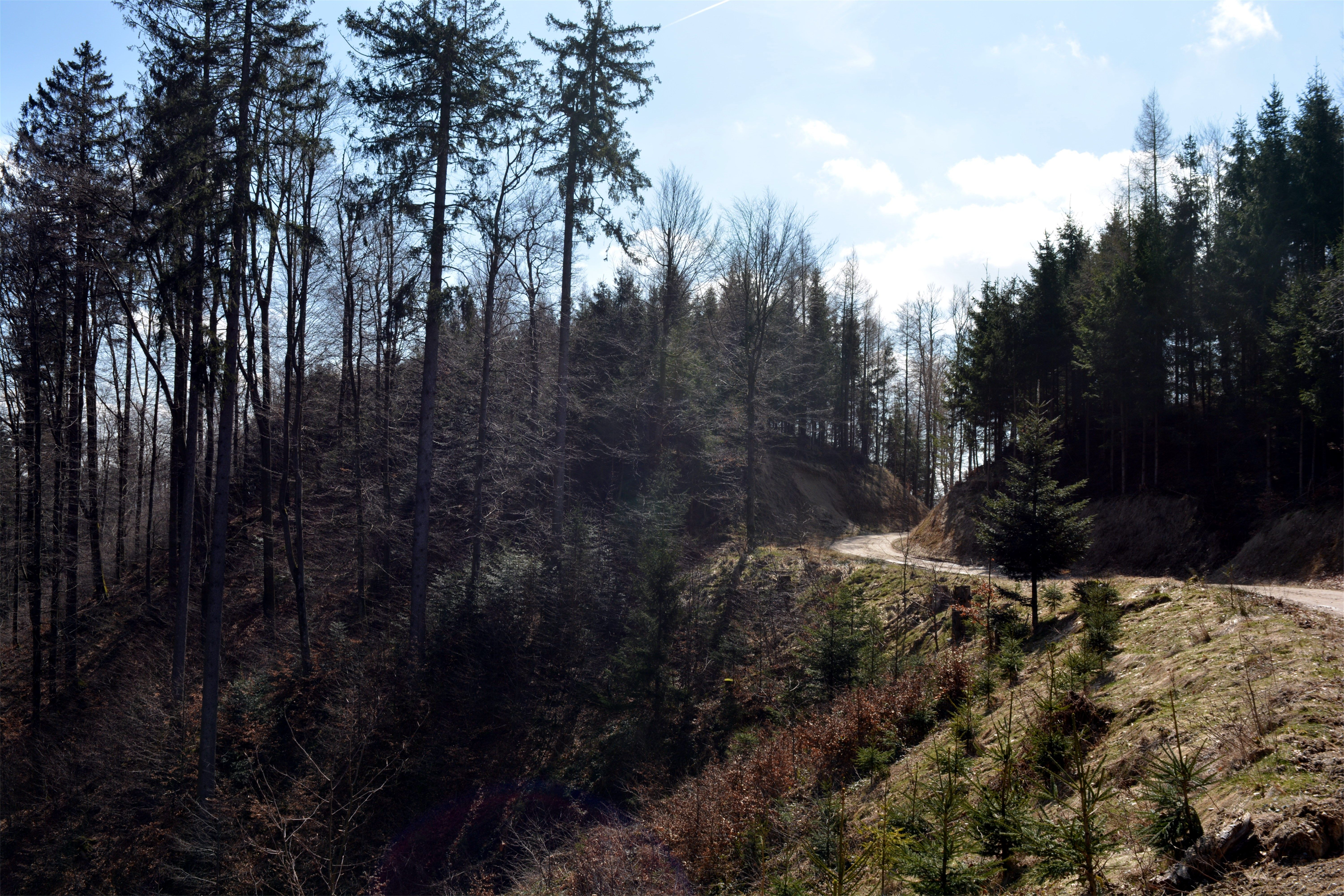 Burgstall Bergheim (auch Burgstall Schlossberg genannt)